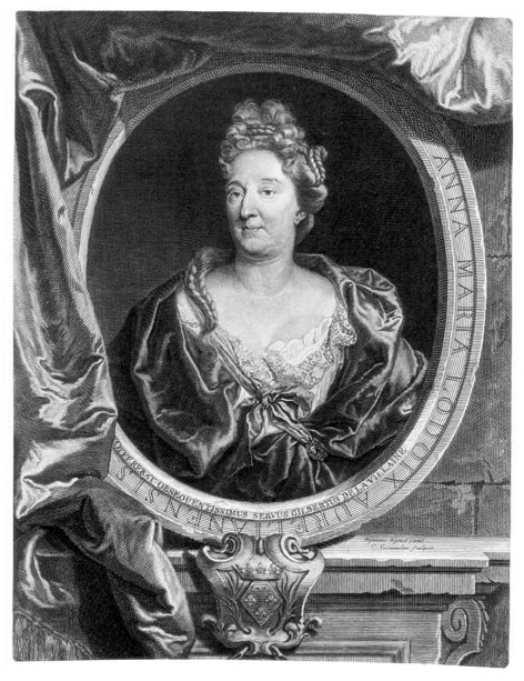 Anne-Marie-Louise d'Orléans, duchesse de Montpensier (1627-1693), dite La Grande Mademoiselle